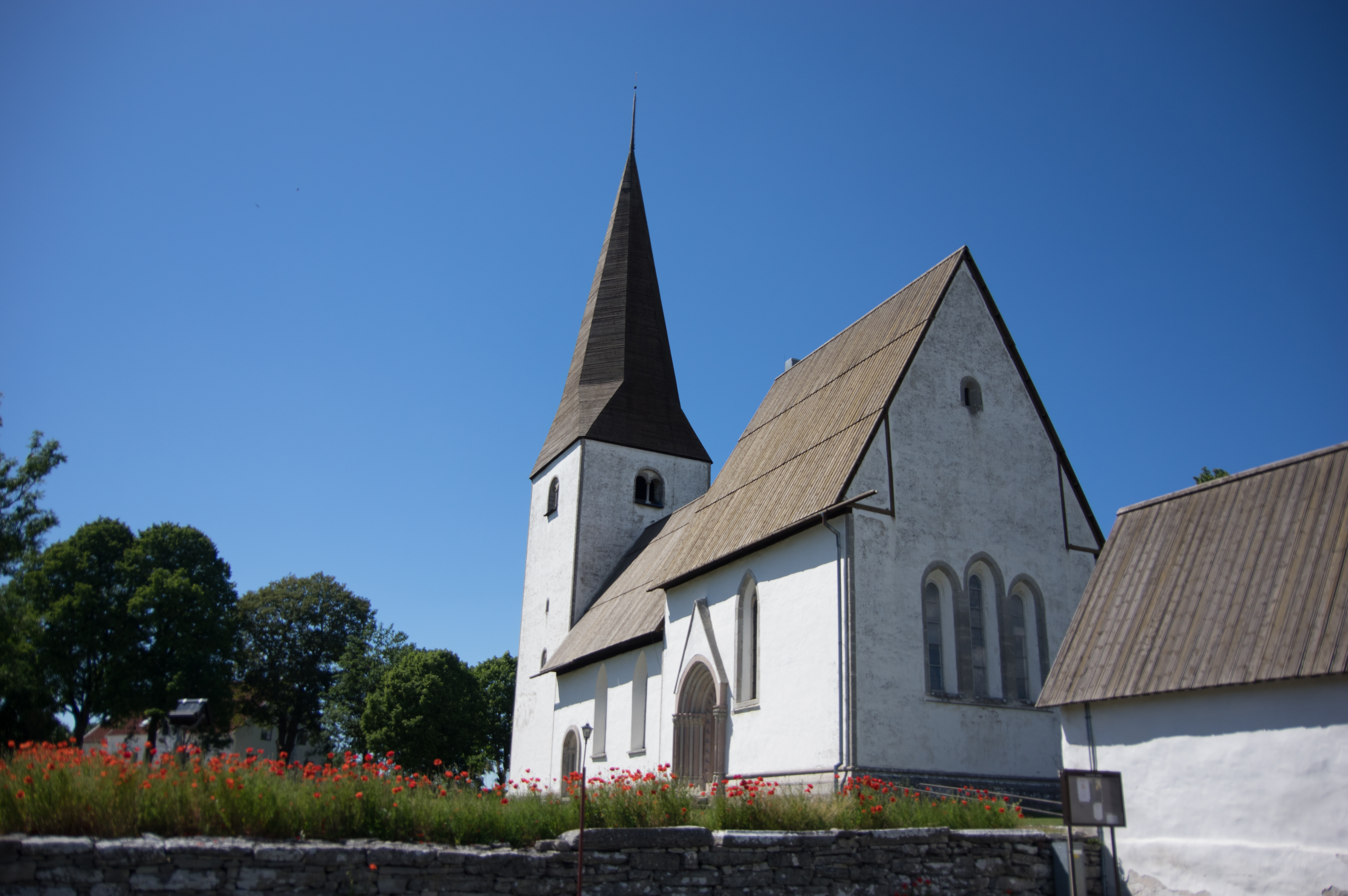 Alskogs kyrka auf Gotland, Die Kirche steht unter Denkmalschutz.